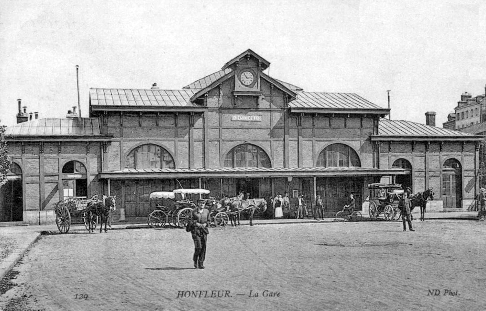 Le bâtiment voyageurs, de la gare d'Honfleur , vu depuis la cour. Le port est dans le dos du photographe.